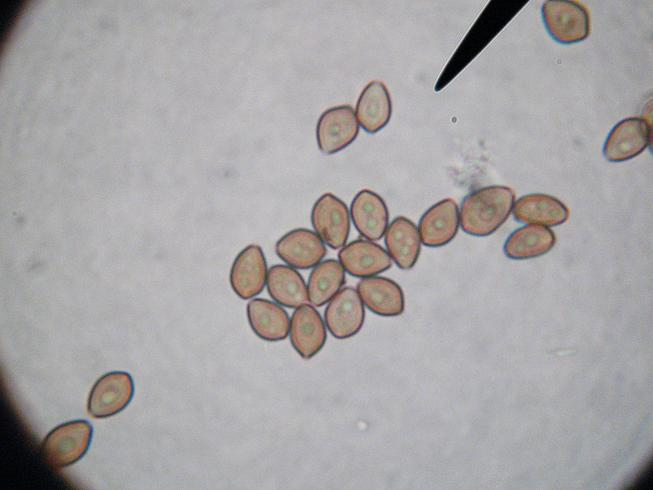 Psilocybe ovoideocystidiata spores